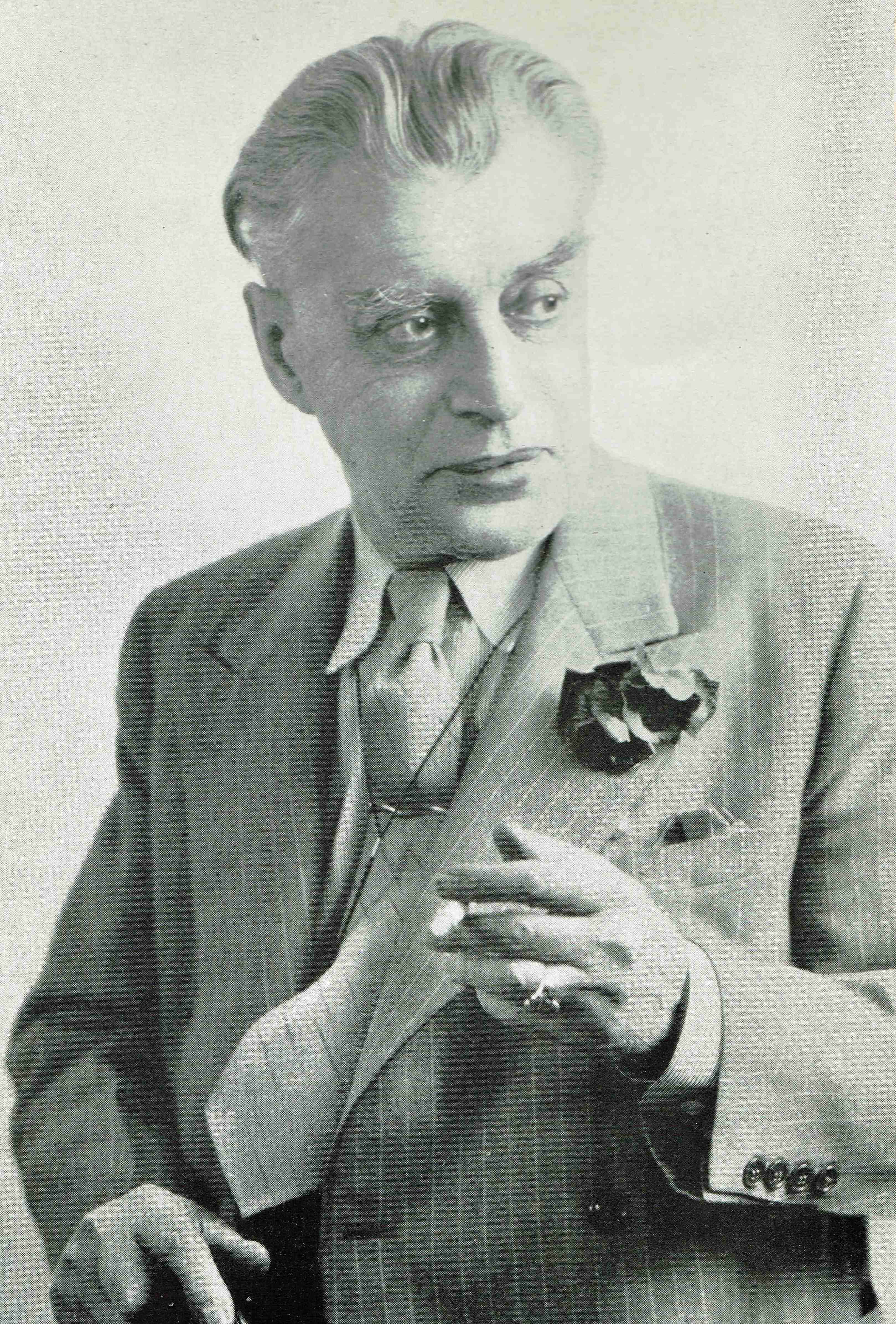 Photo publiée dans l'ouvrage posthume de Frédéric Pelletier, "Initiation à l'orchestre", Montréal, Éditions Fides.